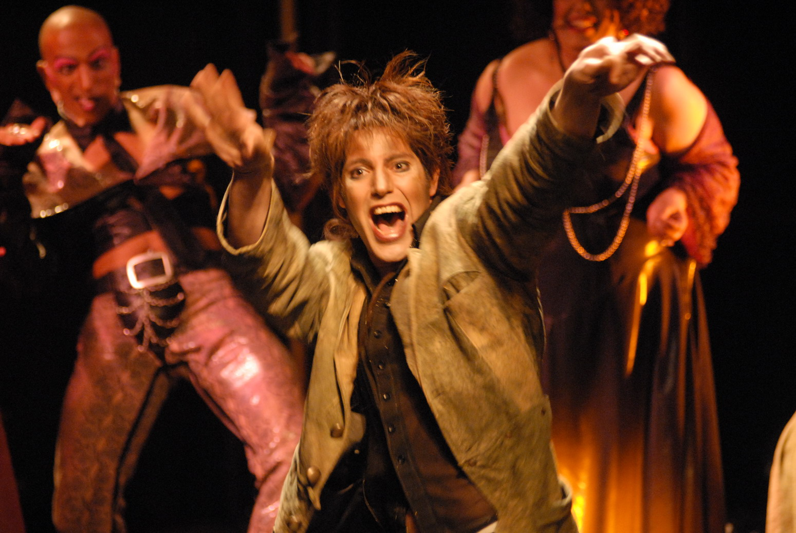 השחקן אורי רביץ,מתוך ההצגה ארץ בושת - תיאטרון נוצר